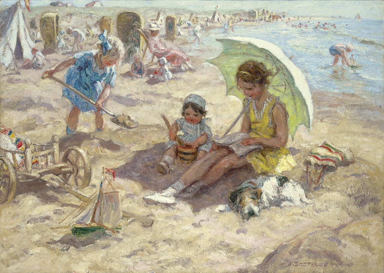 Spelende kinderen op het strand van Katwijk